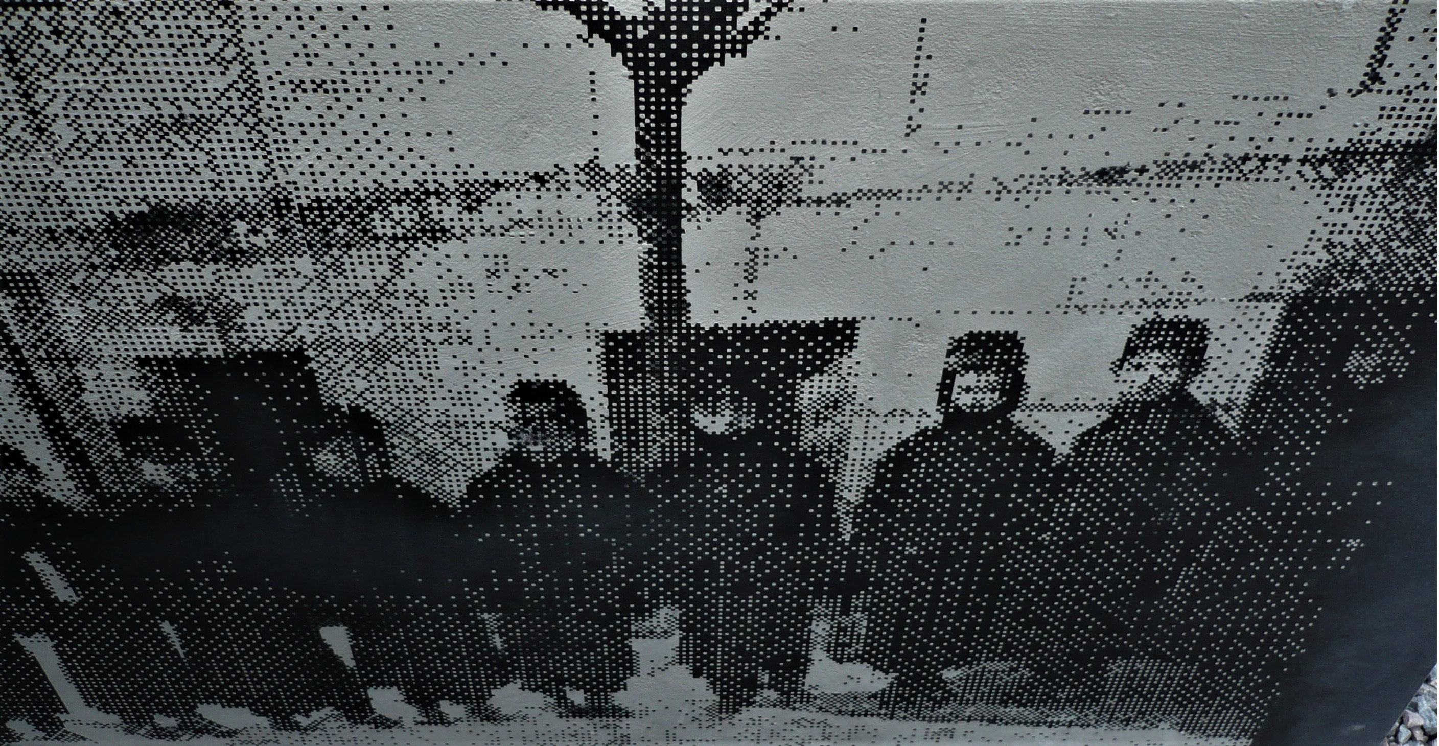 Synagoga Złota Róża we Lwowie. Pomnik